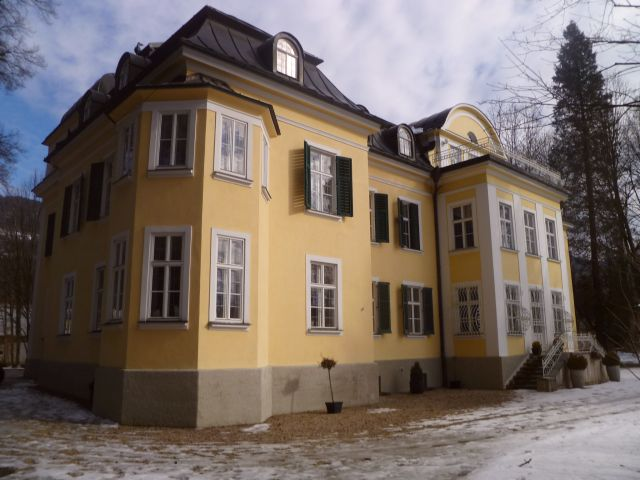 Villa_Trapp-Gartenfront